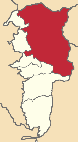 Mapa localizacor del cantón en Bolívar, Ecuador